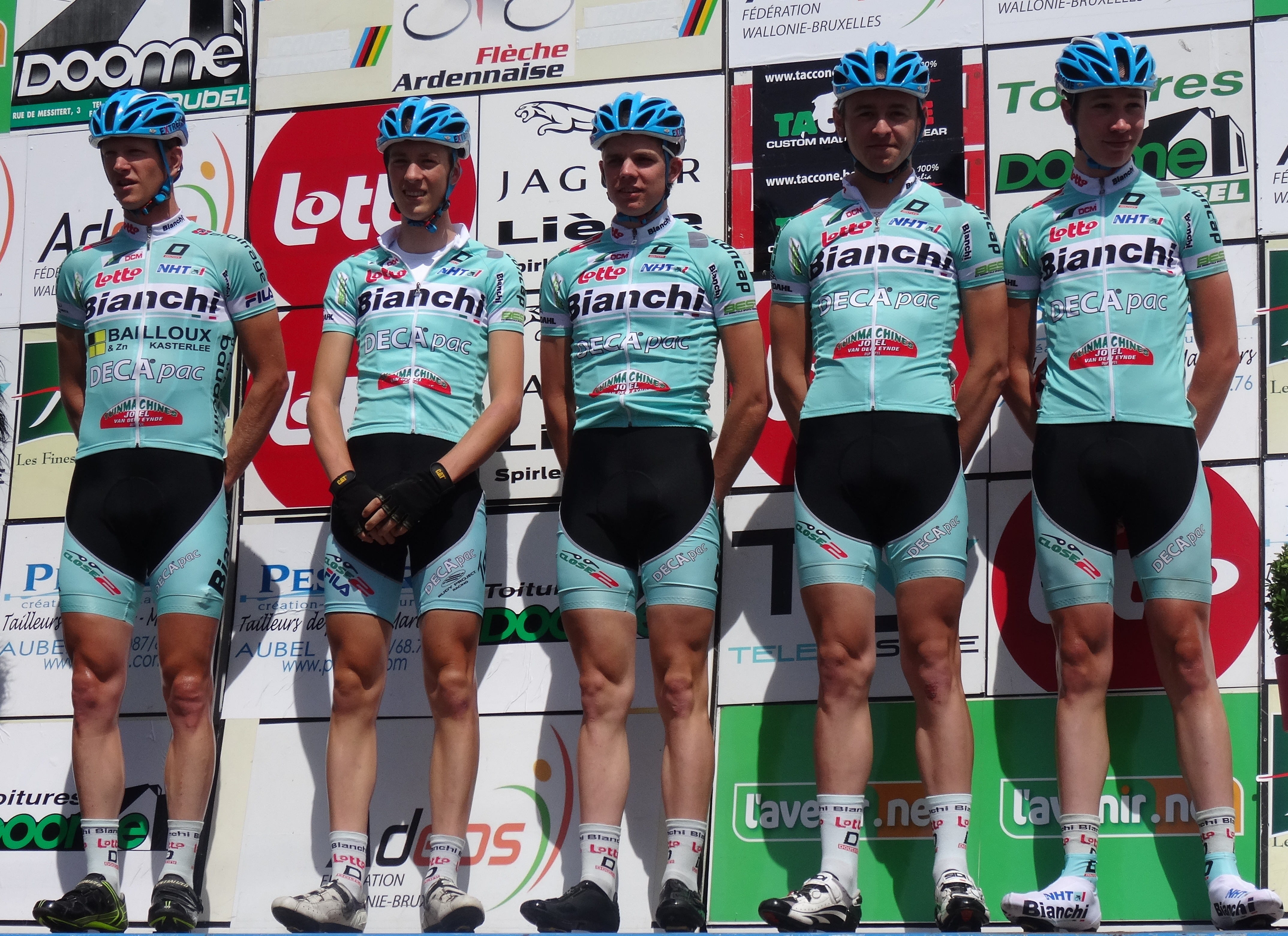 Reportage photographique réalisé le dimanche 22 juin à l'occasion du départ et de l'arrivée de la Flèche ardennaise 2014 à Herve, Belgique.